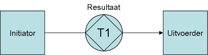 Dit is een diagram van het principe van een DEMO transactie tussen twee actors. Dit figuur is door mij zelf getekend.